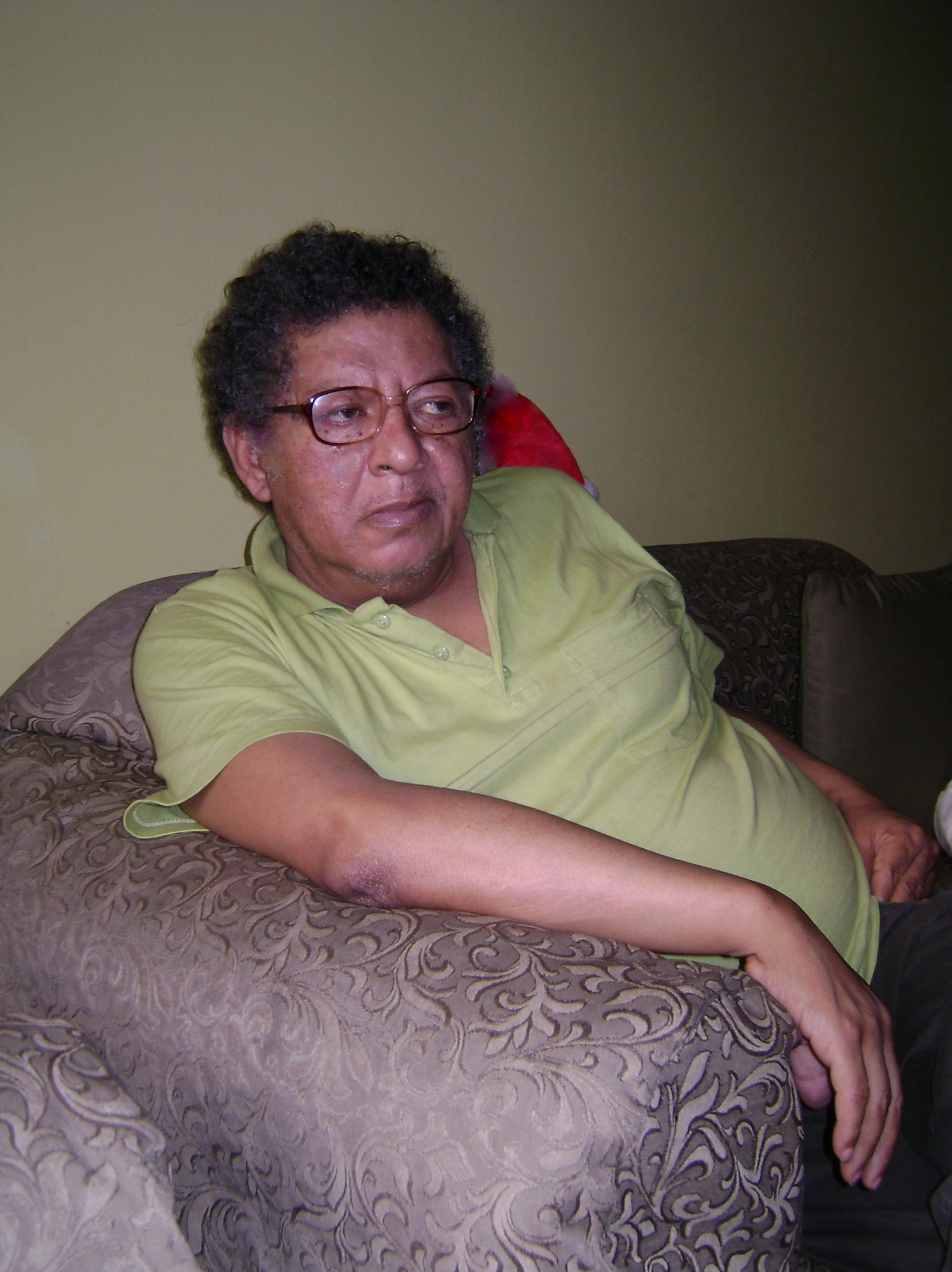 Foto tomada en su casa. La Molina - Lima Perú.